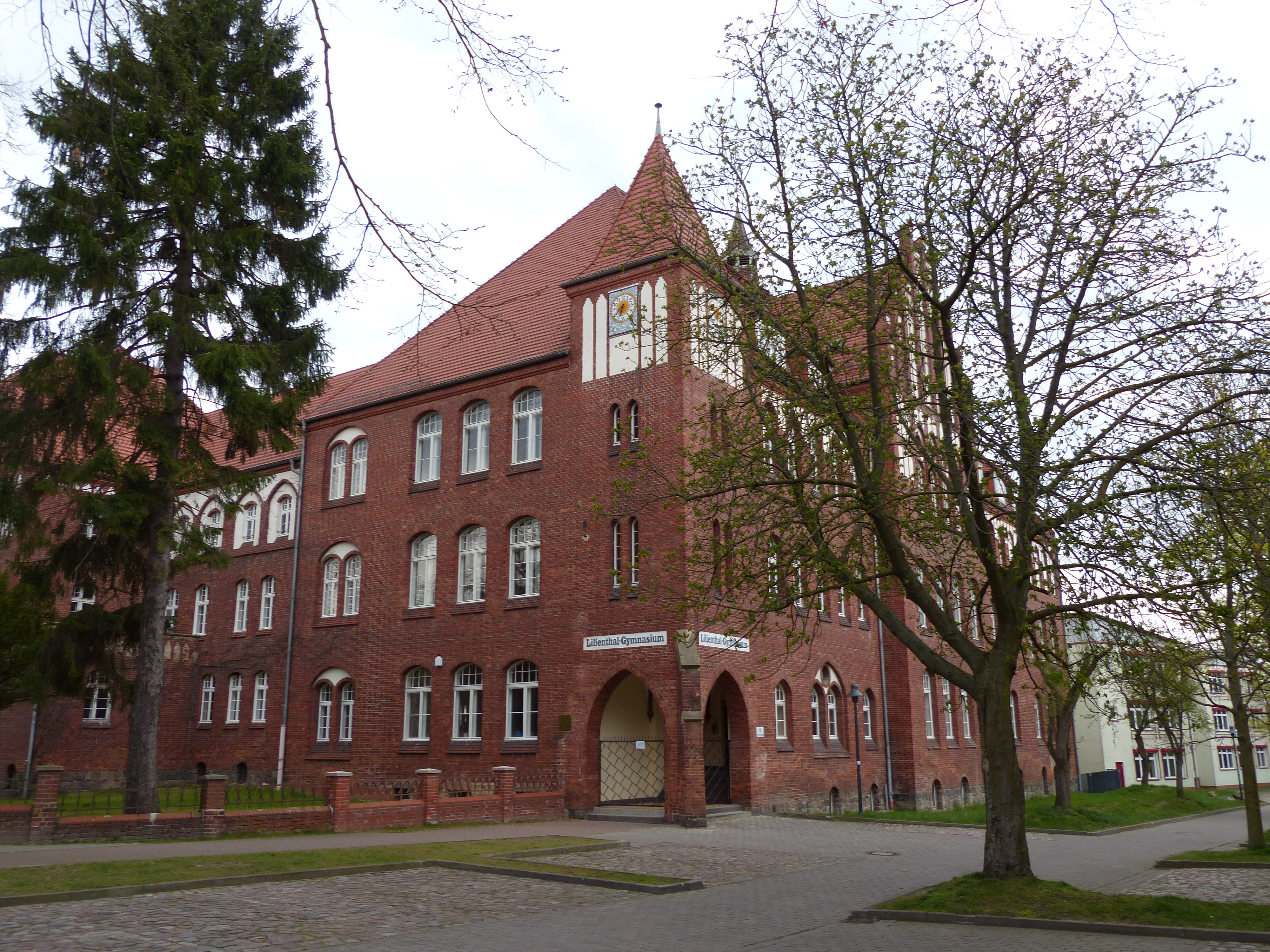 Anklam, Leipziger Allee 22–25, Lilienthal-Gymnasium, Südöstliche Ecke